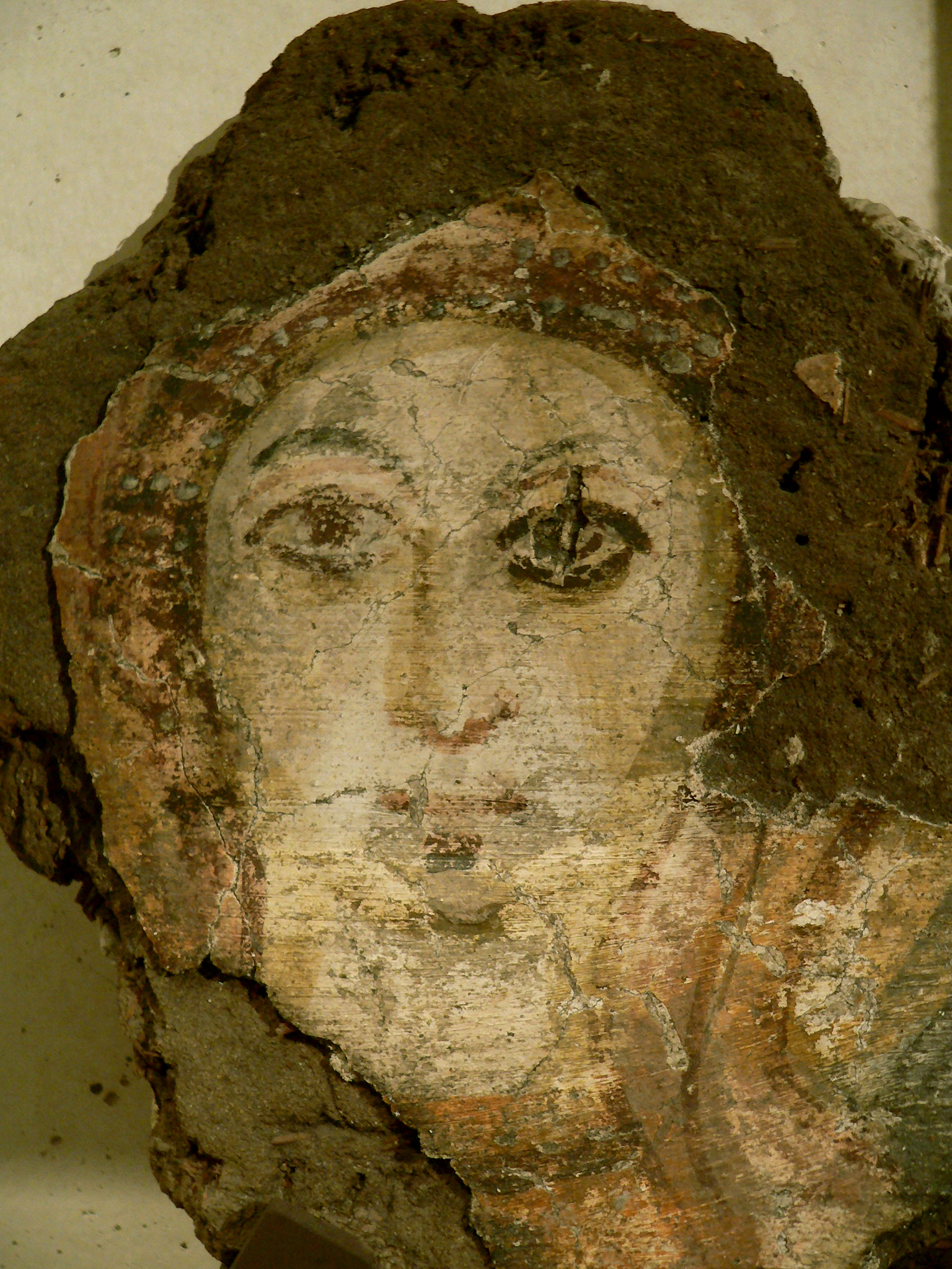 Tête féminine. VIe - VIIe siècle après J.-C. Monastère de Baouit. Peinture à la détrempe. Fragment de peinture murale.